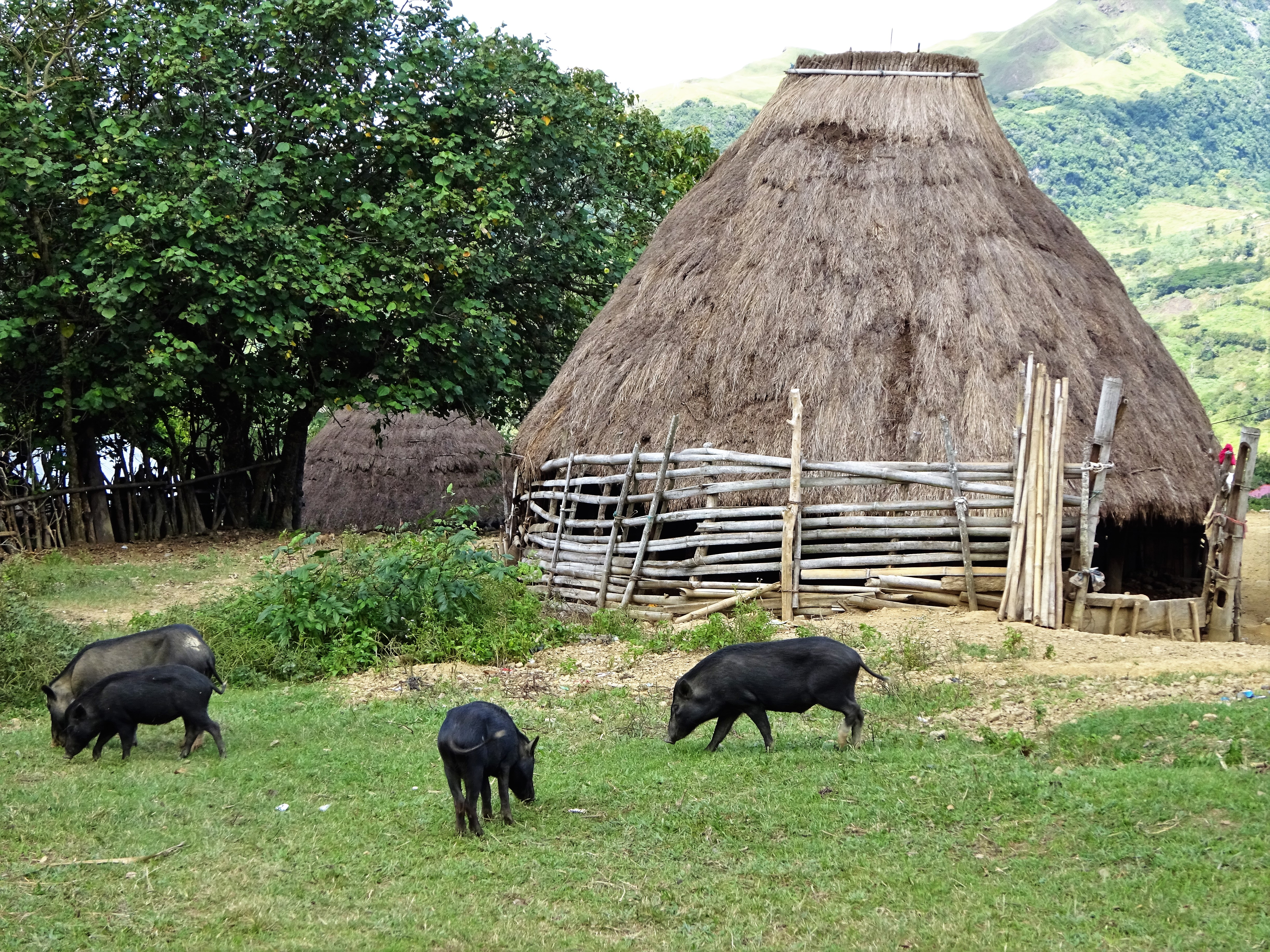 Schweine beim Berg Leolaco